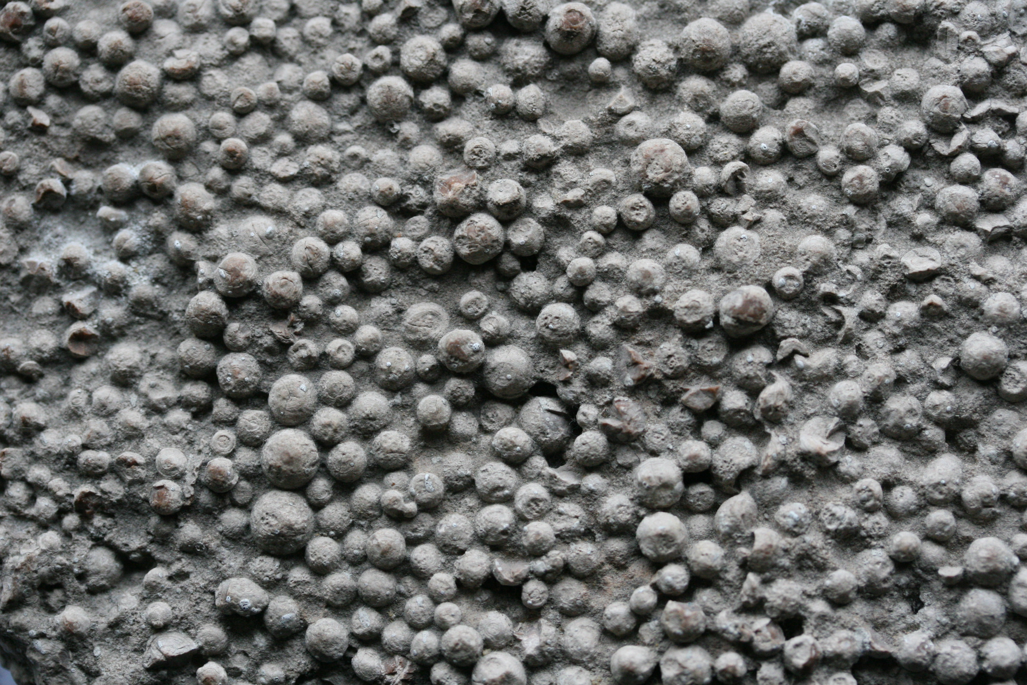 Braunschweiger Rogenstein, verwittert. Muster ca. 11 cm breit, 8 cm hoch